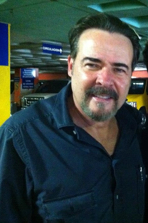 César Évora con Ernesto Magos